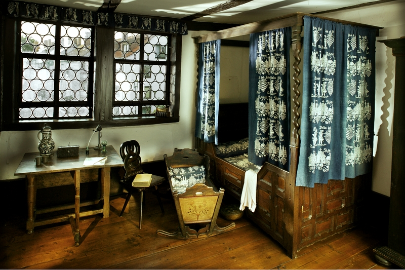 Bachhaus Eisenach, Schlafzimmer, 2004